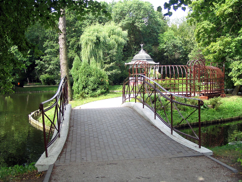 Park Miejski w Pile